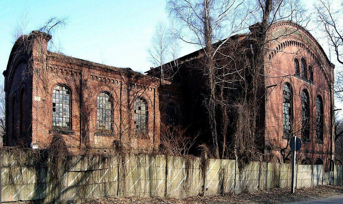 Szyb Zachodni kop. Miechowice - Bytom